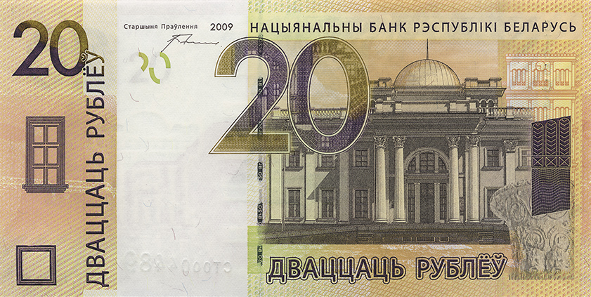 20 белорусских рублей образца 2009 года (лицевая сторона)